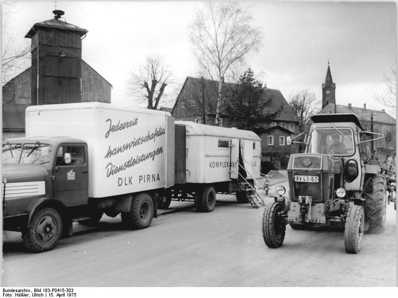 Rosenthal, mobile Reparaturannahmestelle ADN-ZB Häßler 15.4.75 Bez. Dresden: Fahrbare Reparaturannahmestelle. Wöchentlich einmal können die Einwohner der ländlichen Gemeinden des Kreises Pirna in dieser fahrbaren Annahmestelle des Dienstleistungskombinates Pirna, hier auf dem Dorfplatz von Rosenthal, u.a. elektrische Haushaltsgeräte, Schirme und Schuhe zur Reparatur abgeben. Die Einrichtung, die vom DLK Pirna und dem Rat des Gemeindeverbandes Königstein ins Leben gerufen wurde, findet bei den Bürgern der Landgemeinden regen Zuspruch.